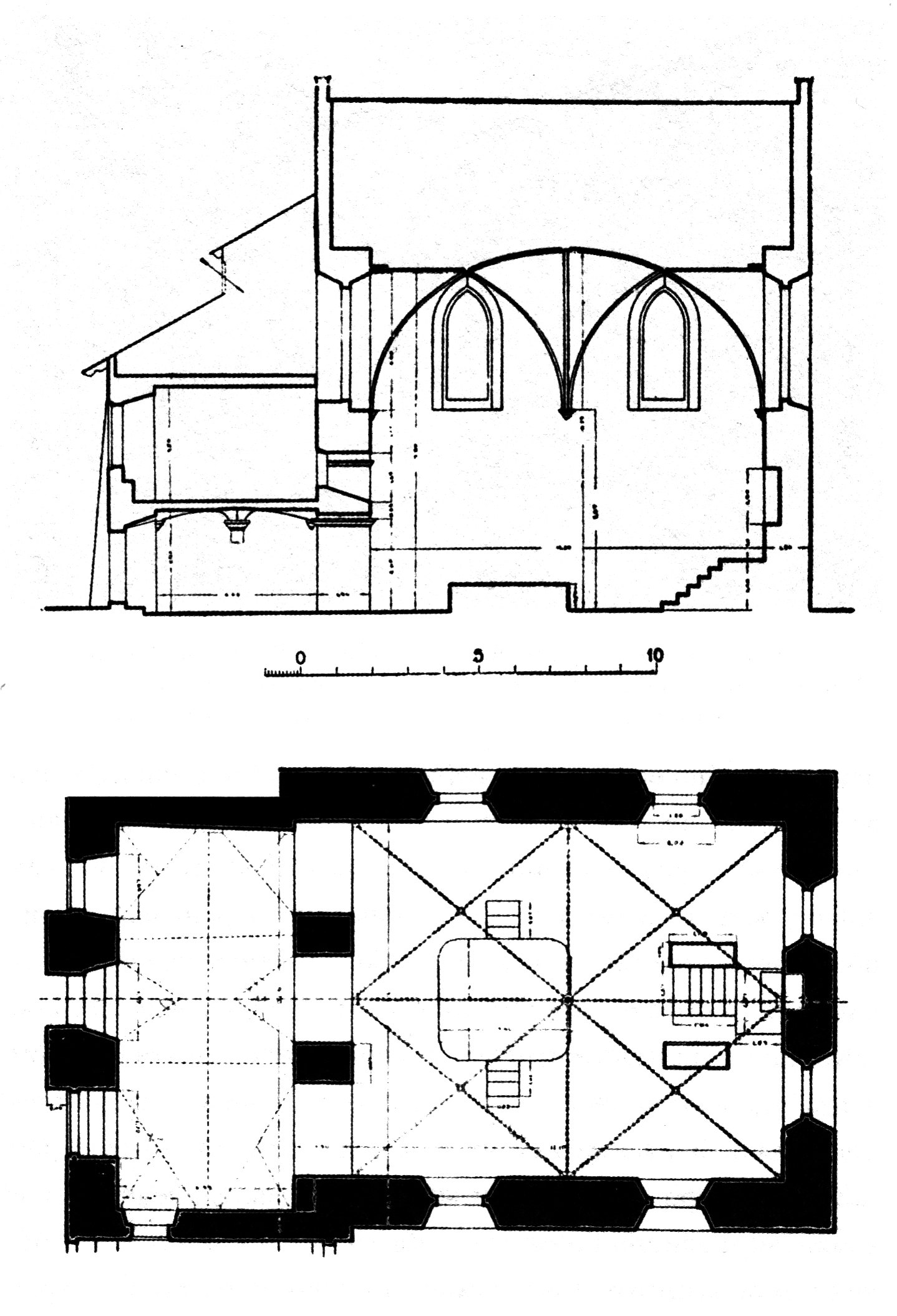 Обміри синагоги Золота Роза у Львові. Архітектор Ян Кароль Зубжицький (1860—1935).